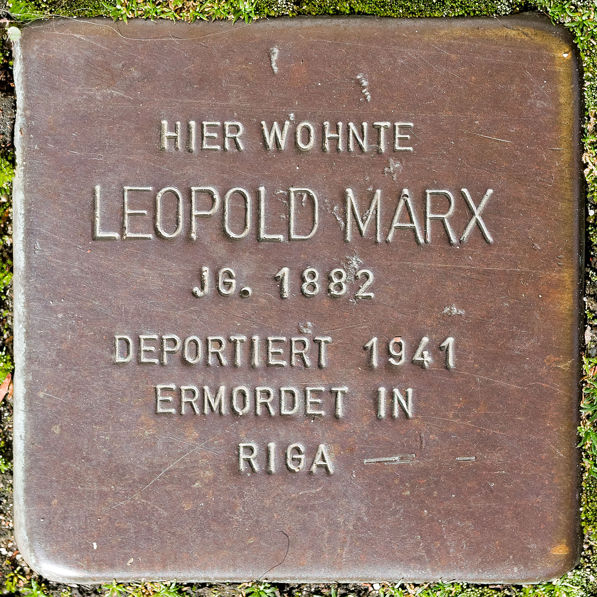 Stolpersteine in Viersen: Marx, Leopold